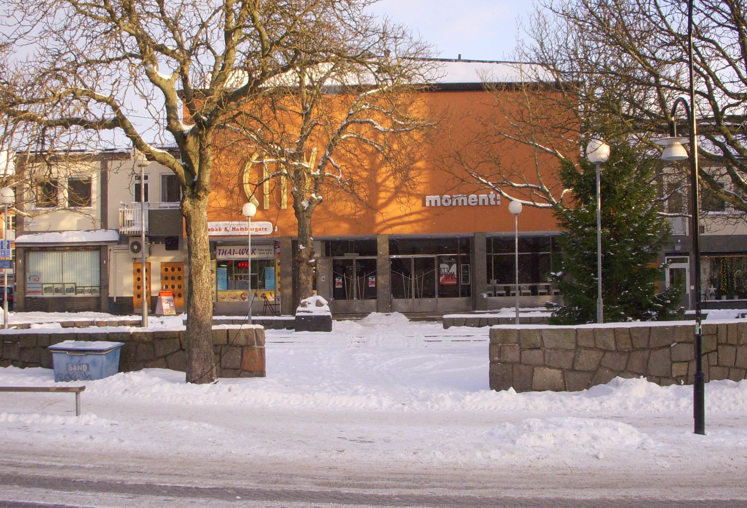 Före detta biografen "City" i Gubbängen, södra Stockholm